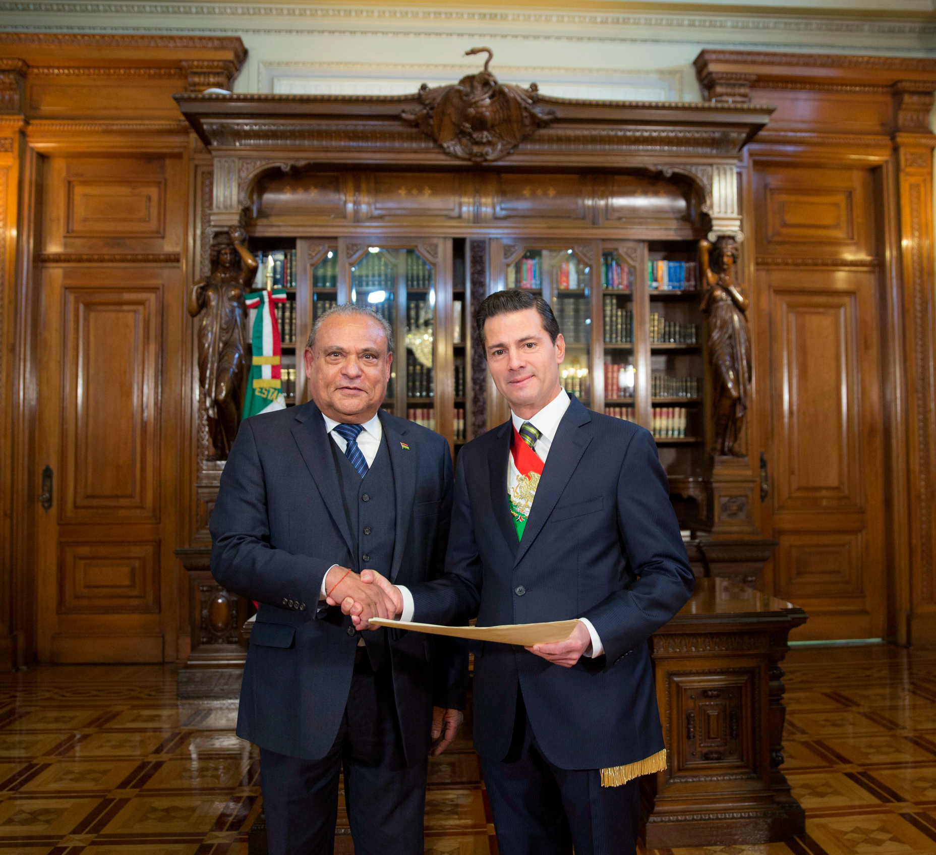 El Presidente Enrique Peña Nieto recibió las cartas credenciales de nuevos Embajadores que iniciaron así sus actividades oficiales como representantes de sus países en México.